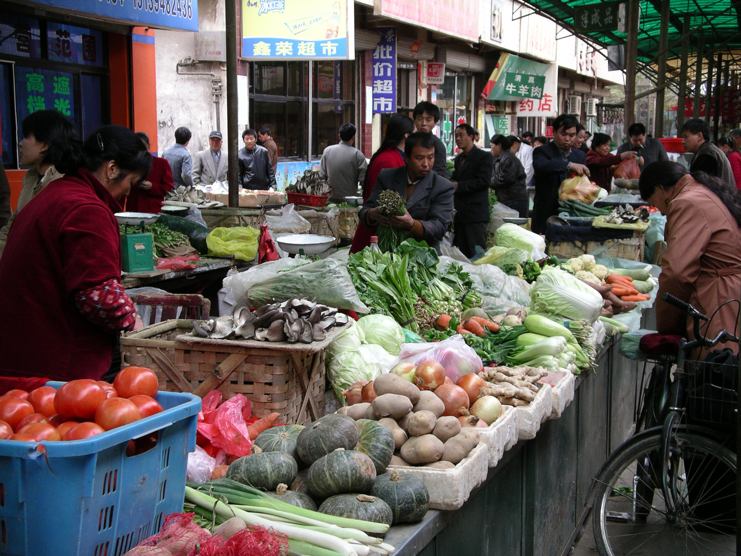 Dunhuang market, Gansu, China